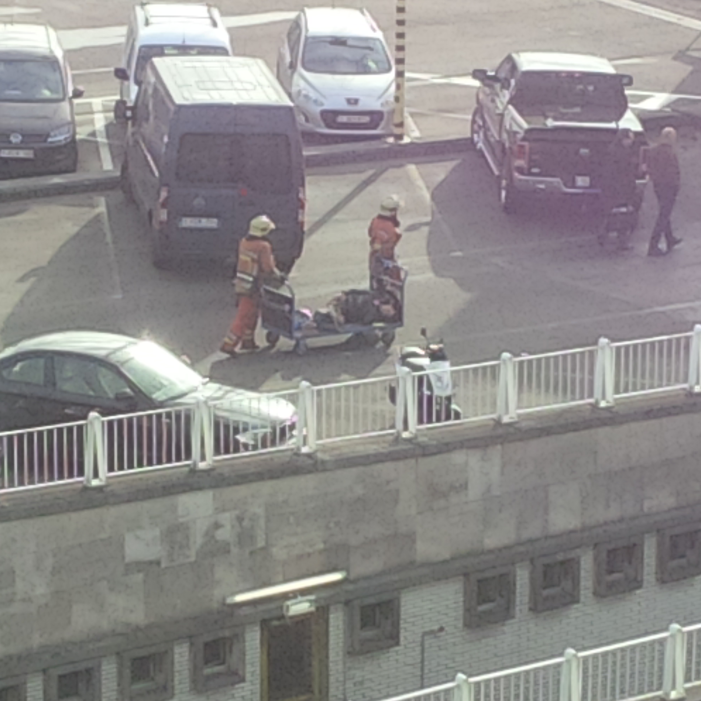 evacuatie slachtoffer